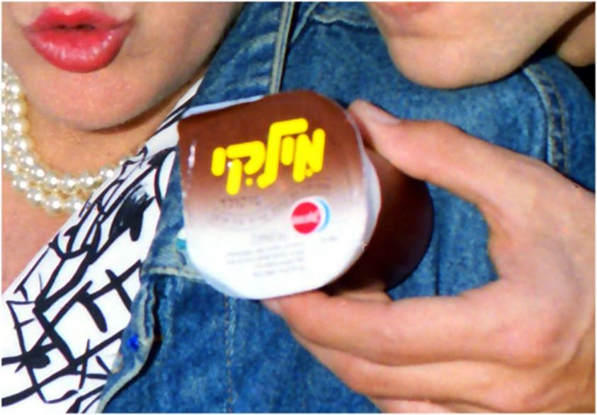 הפקת פרסומת הקרב על המילקי